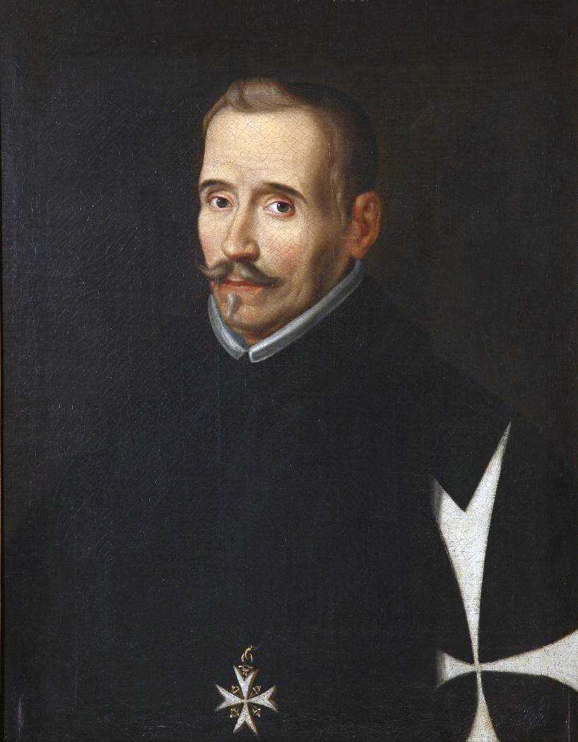 Retrato anónimo del célebre dramaturgo español Félix Lope de Vega y Carpio (1562-1635). Este lienzo procede de las colecciones del pintor Valentín Carderera, de quién pasó al general Romualdo Nogués, aunque entre ambos o antes de que perteneciera a Carderera era del poeta Manuel José Quintana, y fue adquirido por José Lázaro Galdiano antes del año 1902. Félix Lope de Vega aparece en traje talar y ostentando la cruz de caballero de la Orden de Malta. La atribución de este lienzo a la escuela del pintor Eugenio Cajes o al propio Cajes es debida a Valentín Carderera. Además, el rostro del dramaturgo es muy parecido al del retrato que se conserva en el Instituto Valencia de Don Juan, y en el que Lope de Vega aparece de más de medio cuerpo, y asímismo está estrechamente vinculado con el que grabó Juan de Courbes en la edición de 1630 del Laurel de Apolo, aunque también tiene cierto parecido con el que se conserva en el Museo del Ermitage de San Petersburgo, que ha sido atribuido a Luis Tristán sin argumentos concluyentes según algunos autores. La calidad mediocre de esta obra, que es «un tanto seca» a juicio de algunos historiadores, hacen dudar de que hubiera sido ejecutada por un destacado maestro, por lo que posiblemente sólo sea una de las multiples copias del retrato del dramaturgo «que se veían», ya en su tiempo, en casa de los hombres «curiosos» o de gusto.